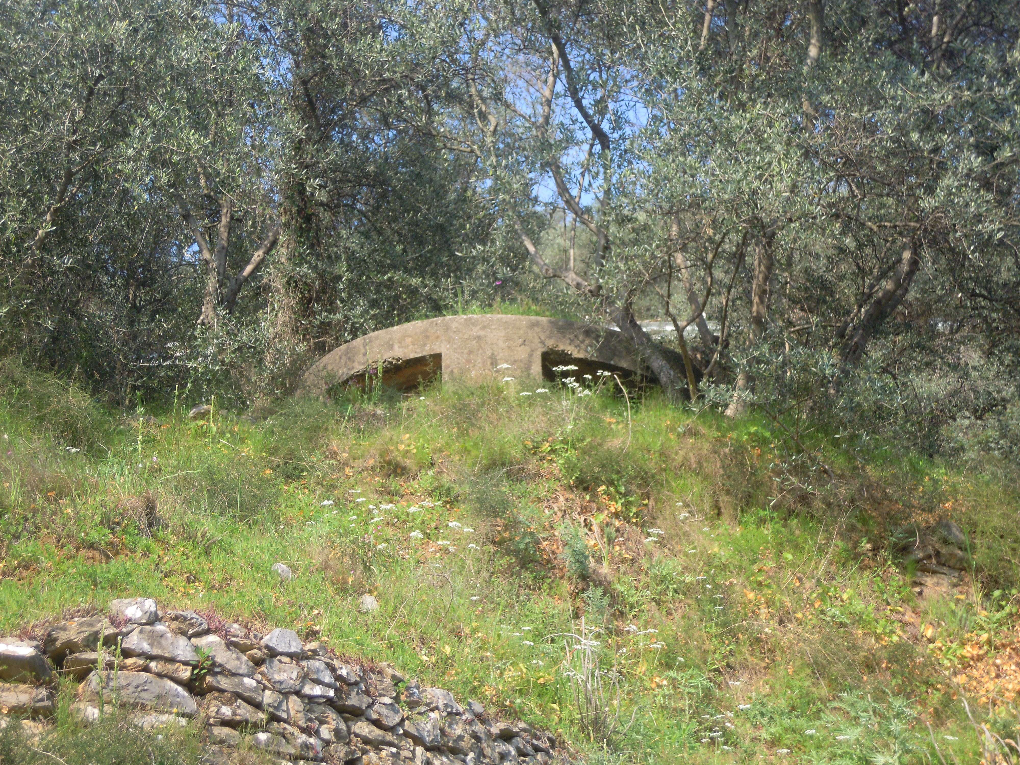 Primo Bunker Strada Statale 12 tratta Pisa-Lucca